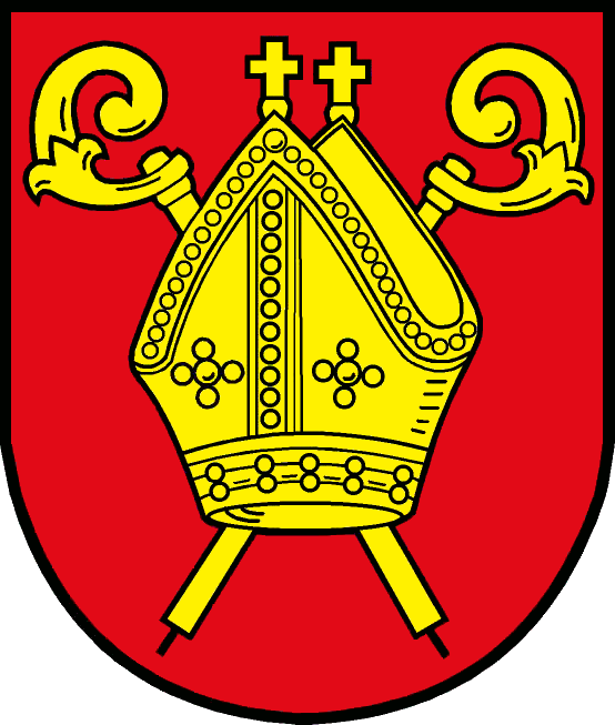 Das Wappen wurde unter der Nr. 70 der Wappenrolle von Mecklenburg-Vorpommern registriert.